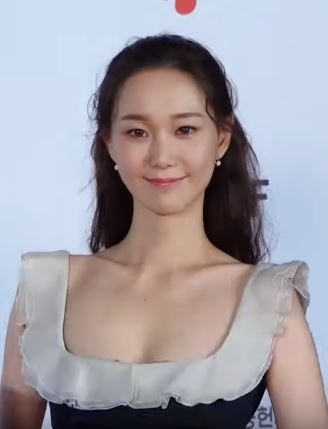 '제24회 부산국제영화제(BIFF)' 개막식 레드카펫 및 포토월이 3일 오후 부산 해운대구 영화의 전당에서 열렸다.